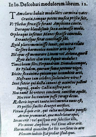 Epigramme pour Jean Escobar par Pierre Trichet, 1635